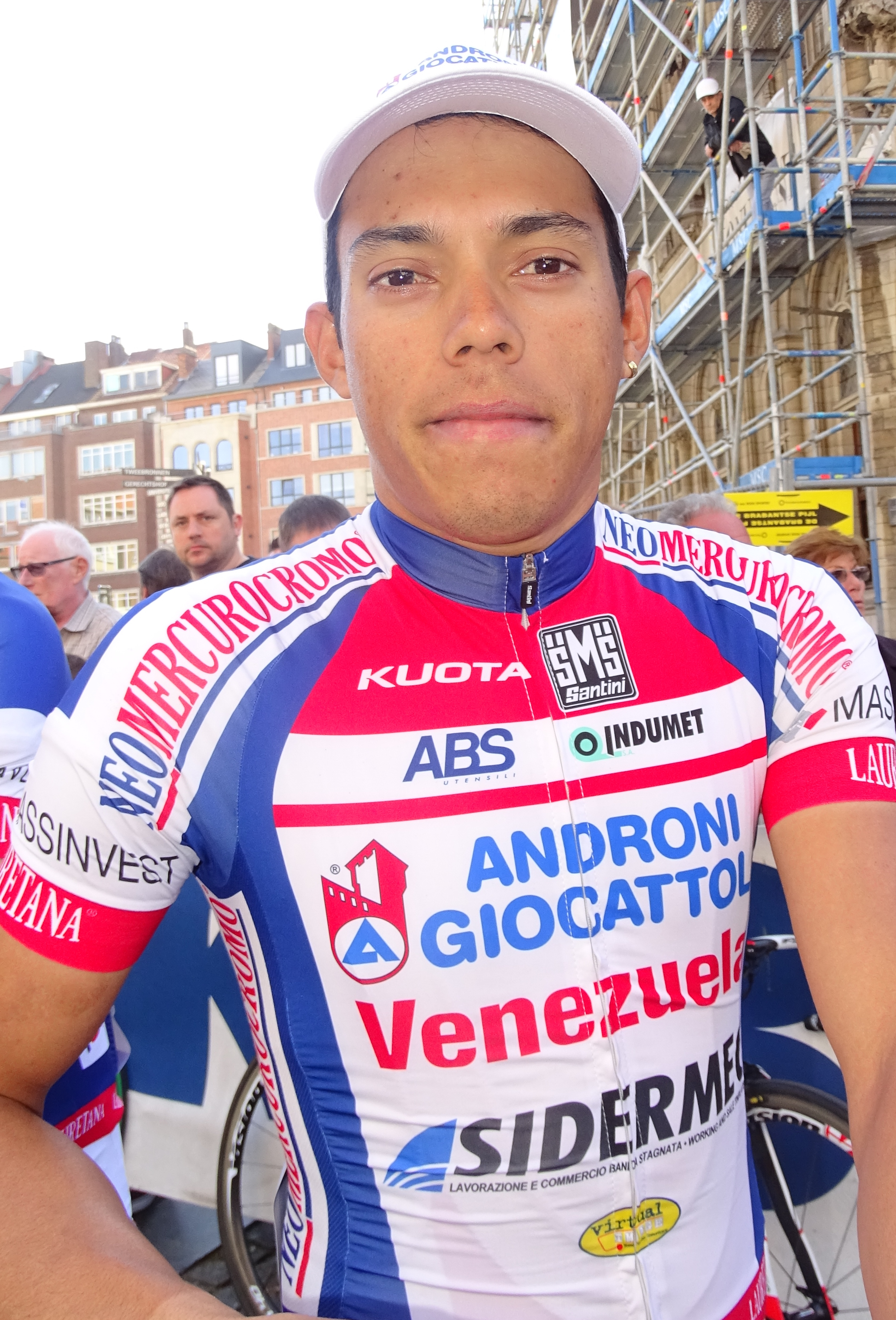 Reportage réalisé le mercredi 15 avril à l'occasion du départ de la Flèche brabançonne 2015 à Louvain, Belgique.